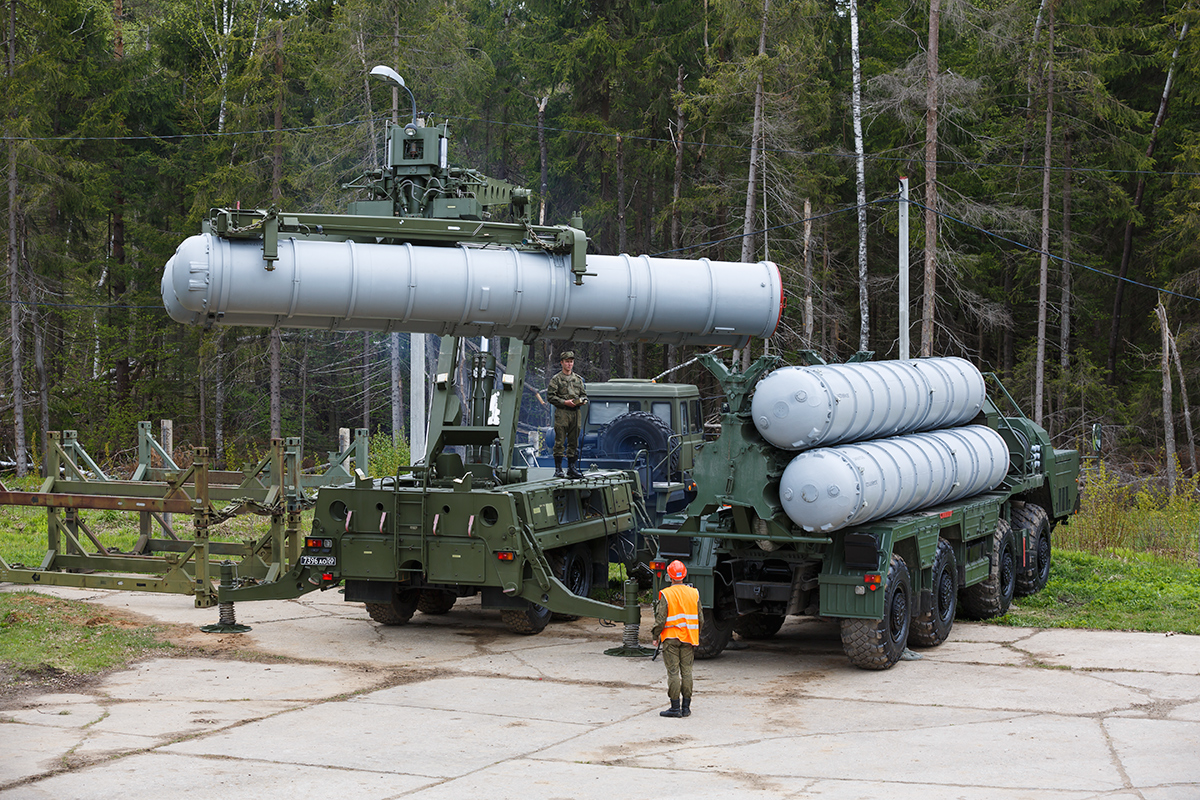 Учения 93-го гвардейского зенитного ракетного полка 4-й дивизии ПВО.